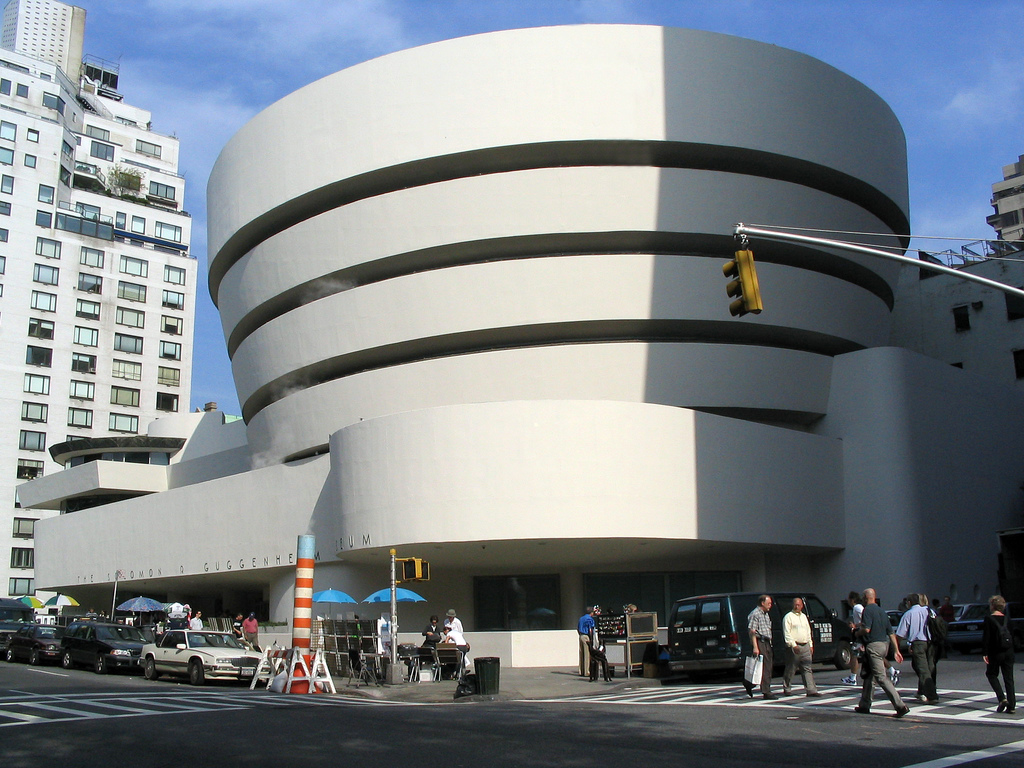 Solomon R. Guggenheim Museum